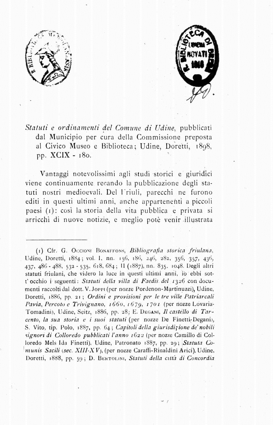 pagina 1